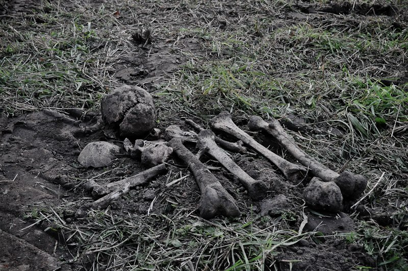 Человеческие костные останки, найденные во время археологического исследования Старотроицкого некрополя у Троицкой церкви Яранска, Россия